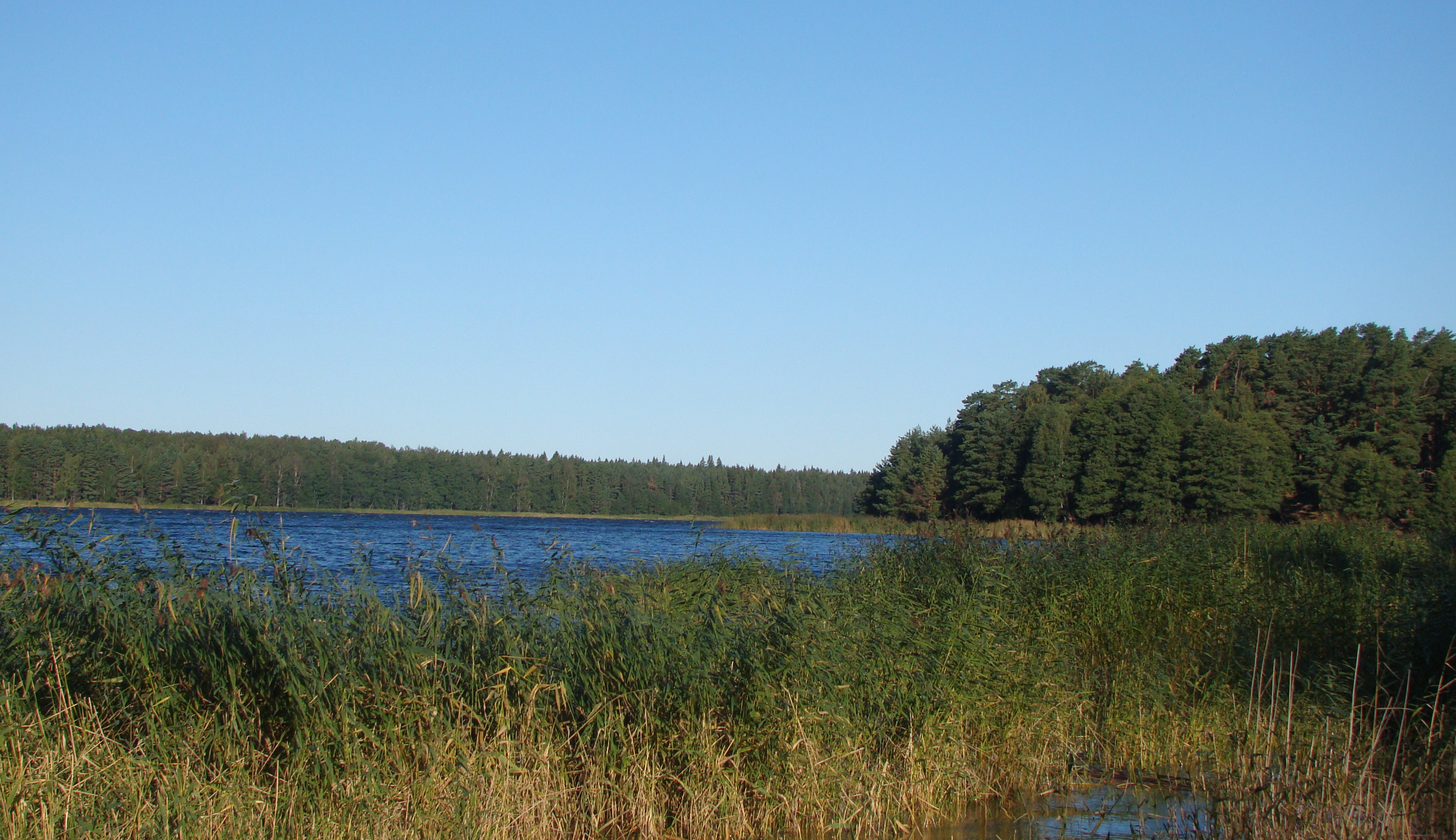 Кургальский заказник, Кингисеппский район This image is related to the protected area of Russia number 4710099